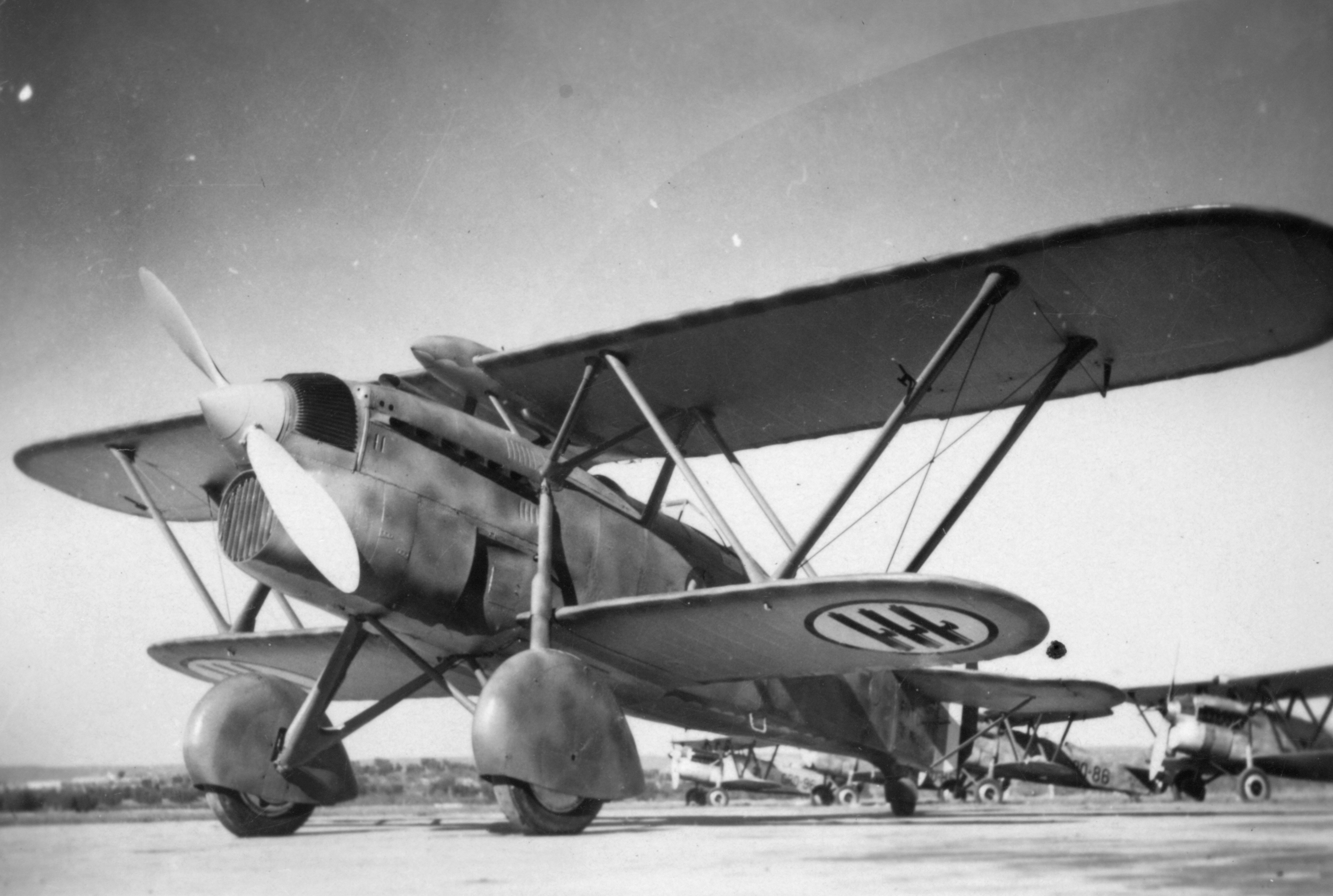 Az Olasz Légierő FIAT CR-32 típusú vadászrepülőgépe. Tags: airport, transport, military, Fiat-brand, Italian brand, airplane, fighter plane, biplane Title: Az Olasz Légierő FIAT CR-32 típusú vadászrepülőgépe.